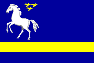 Prapor obce Pozděchov